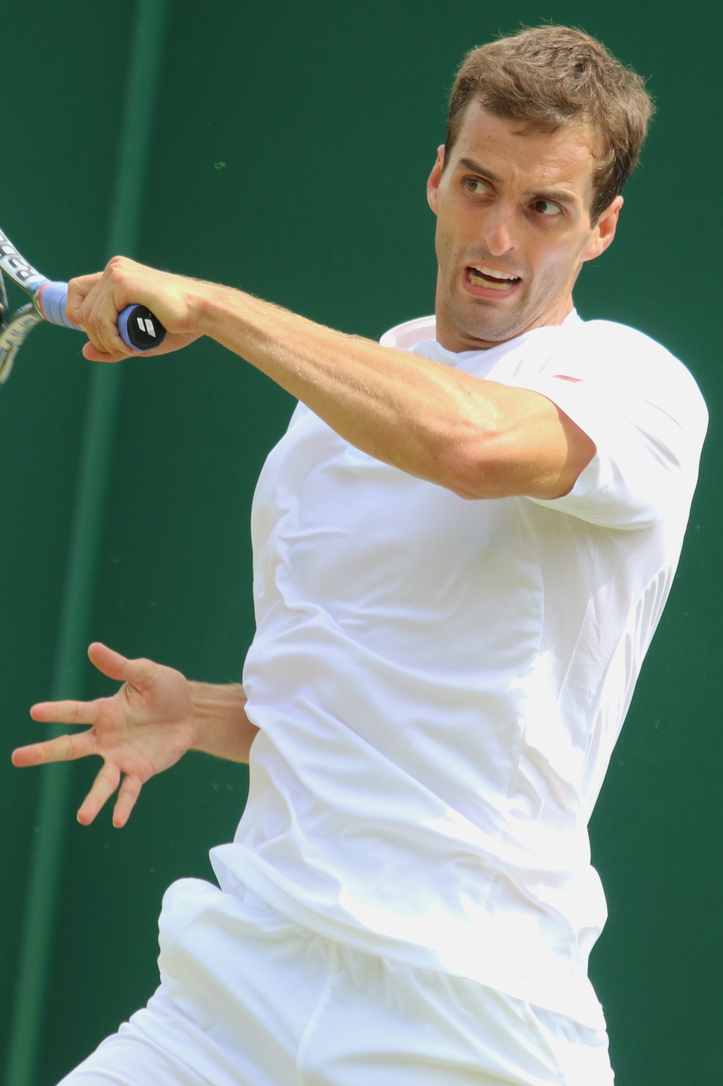 Ramos Vinolas WM17 (6)